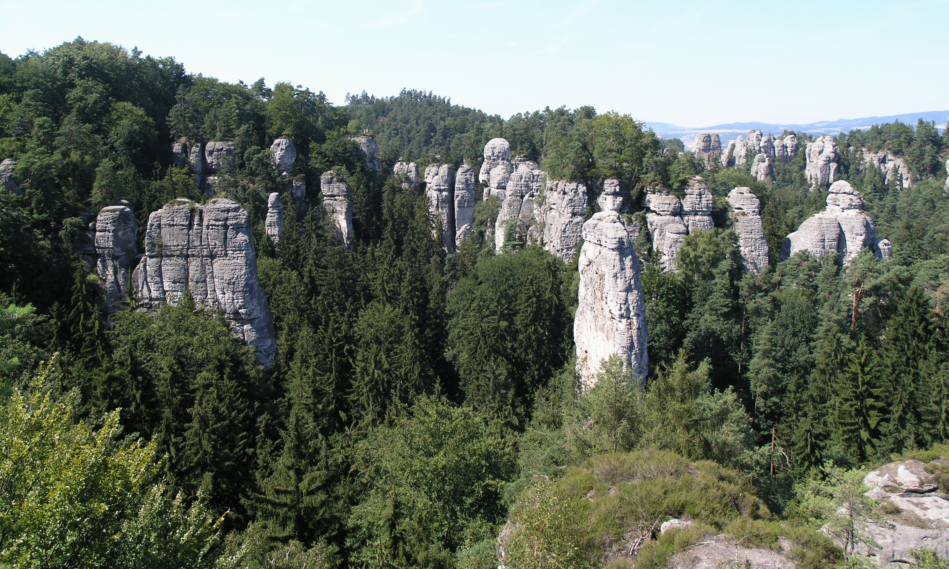 Hruboskalsko